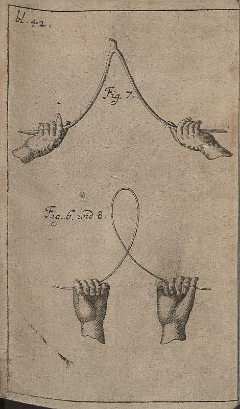 Original image description from the Deutsche Fotothek Radiästhesie & Wünschelrute